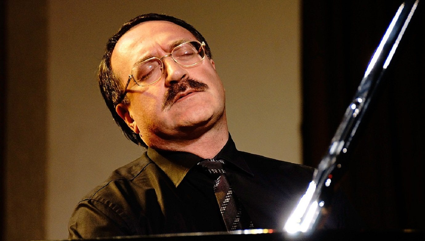 Дании́л Бори́сович Кра́мер (англ. Daniel Kramer; род. 21 марта 1960, Харьков) — советский и российский джазовый пианист, педагог, композитор и продюсер